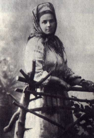 Уладальніца маёнтка Бастынь В. Струкава ў сялянскім касцюме. 1915